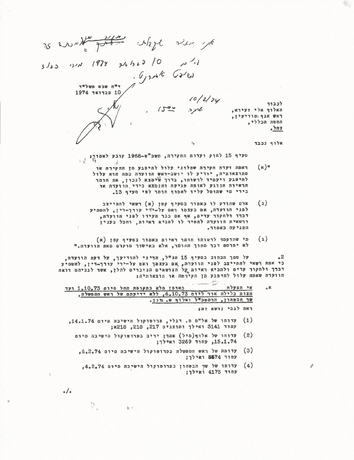 מכתב אזהרה ששלחה ועדת אגרנט לאלי זעירא, באחד הסעיפים הועדה מאשימה אותו באי פתיחת האמצעים המיוחדים